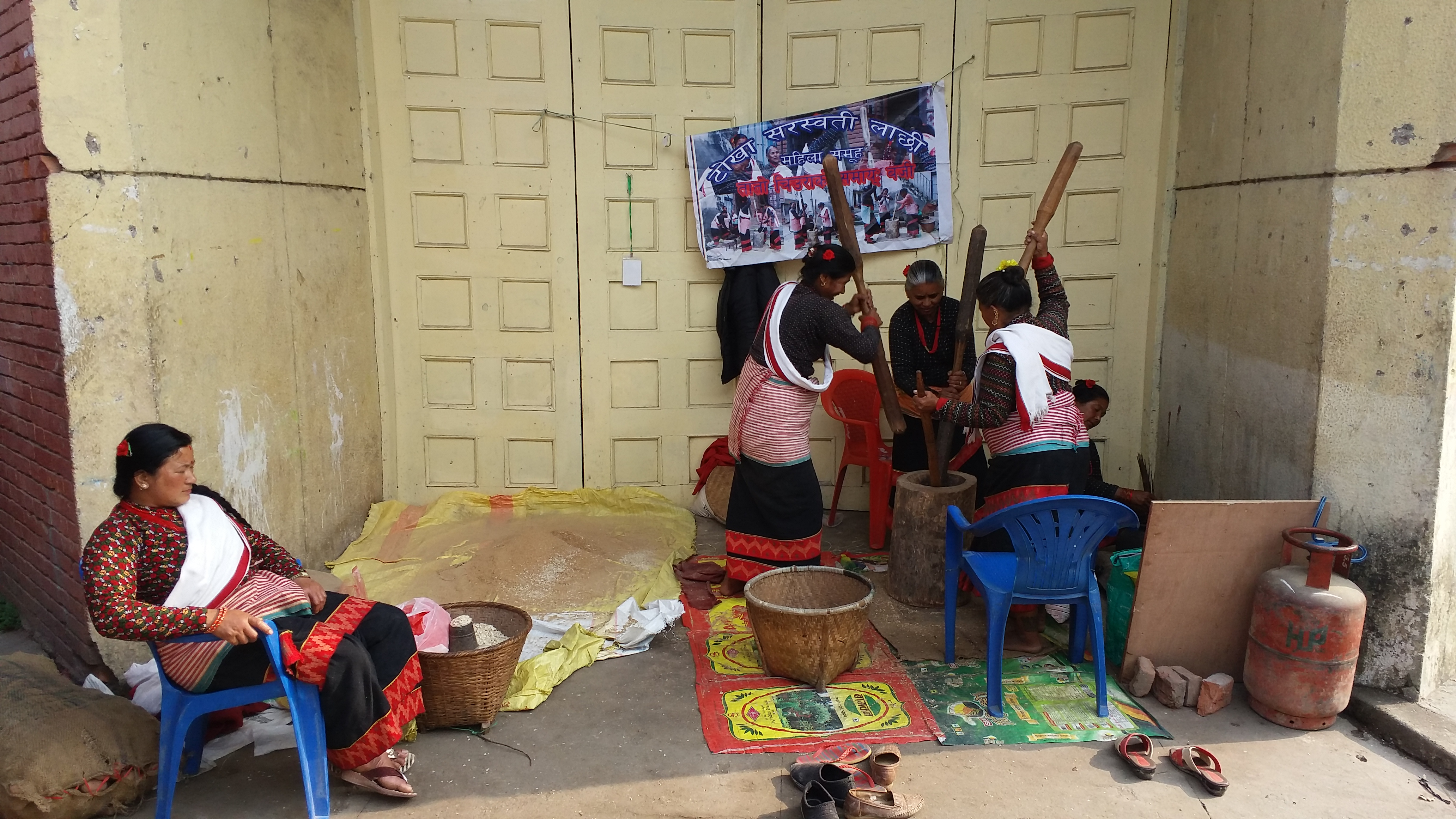 नेपाली: नेवारी महिला समुहबाट परम्परागत तरिकाबाट बनाएको चिउरा(समयबजी) । टुडिखेल, काठमाडौँ ।